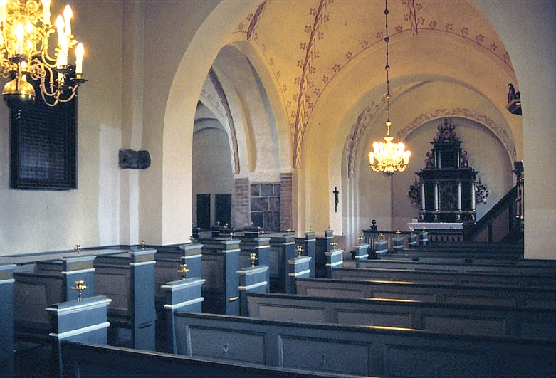 Vejerslev Kirke, Favrskov Kommune, kirkerummet set mod øst